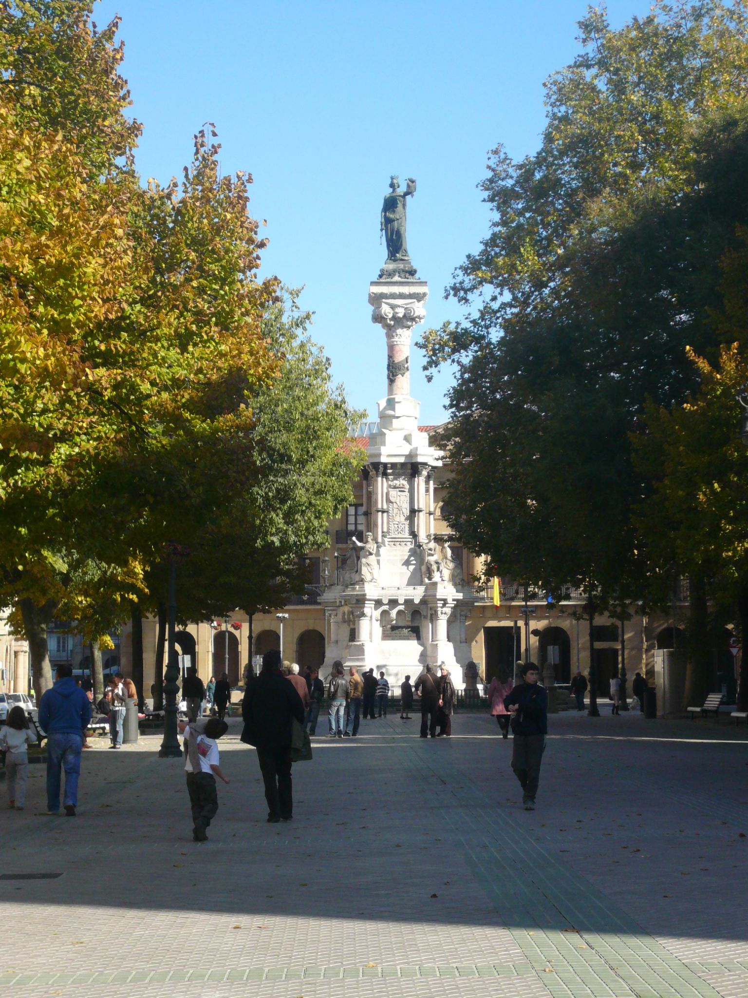 Gora Foruak!